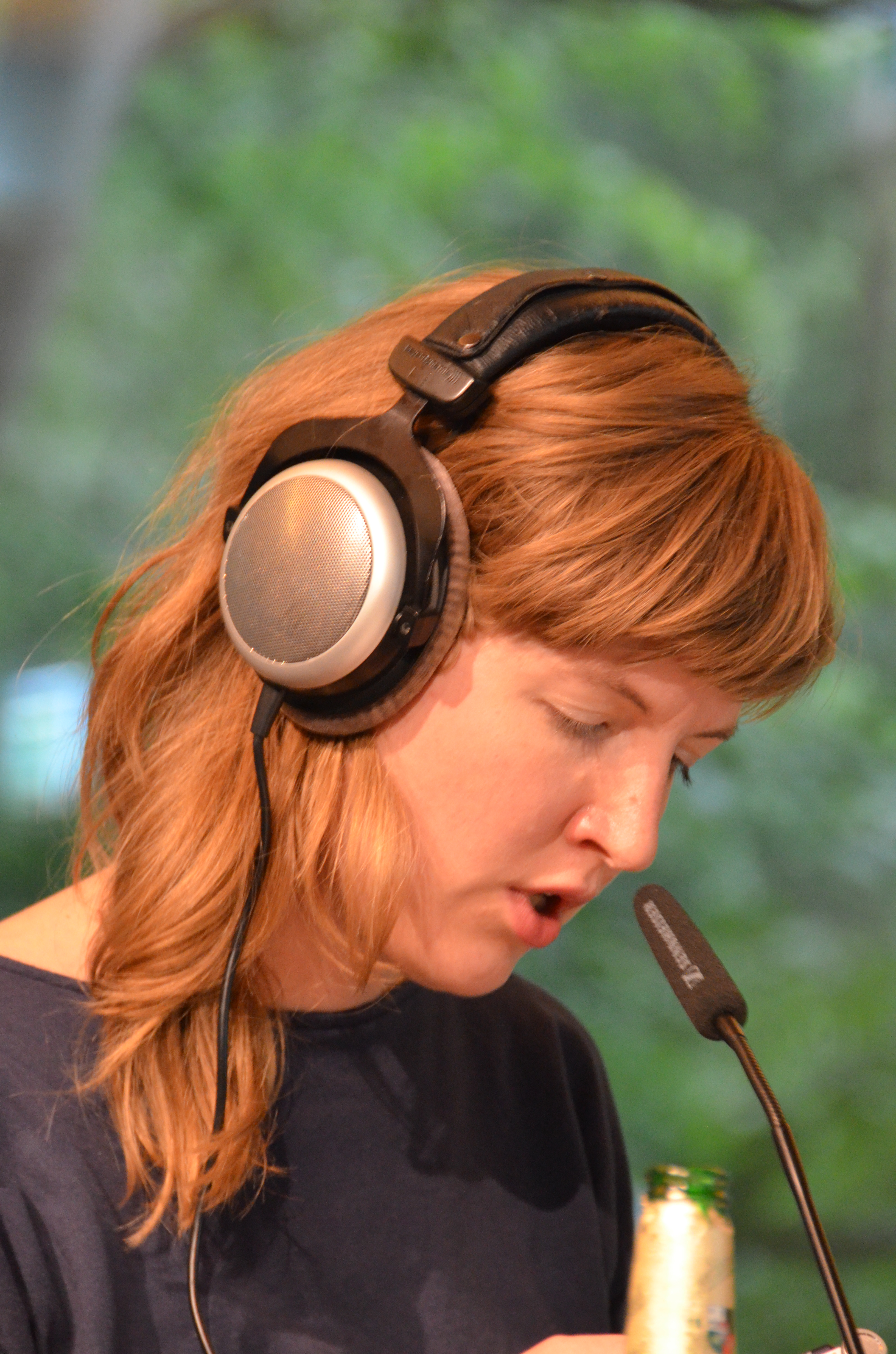 Mara Genschel liest auf dem Poesiefestival Berlin 2015